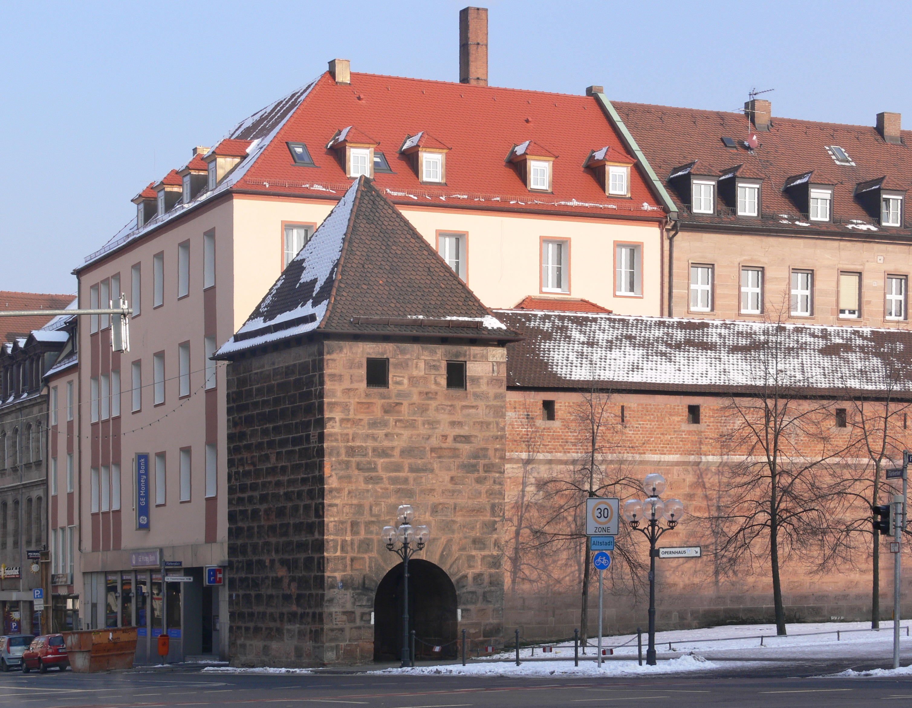 Nürnberg, Stadtbefestigung, Abschnitt "Frauentormauer" Moderner Bunker am Färbertor, der Turm "rotes H" ersetzt, Feldseite